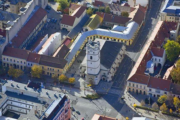 Református kistemplom (Debrecen) - légi felvételen